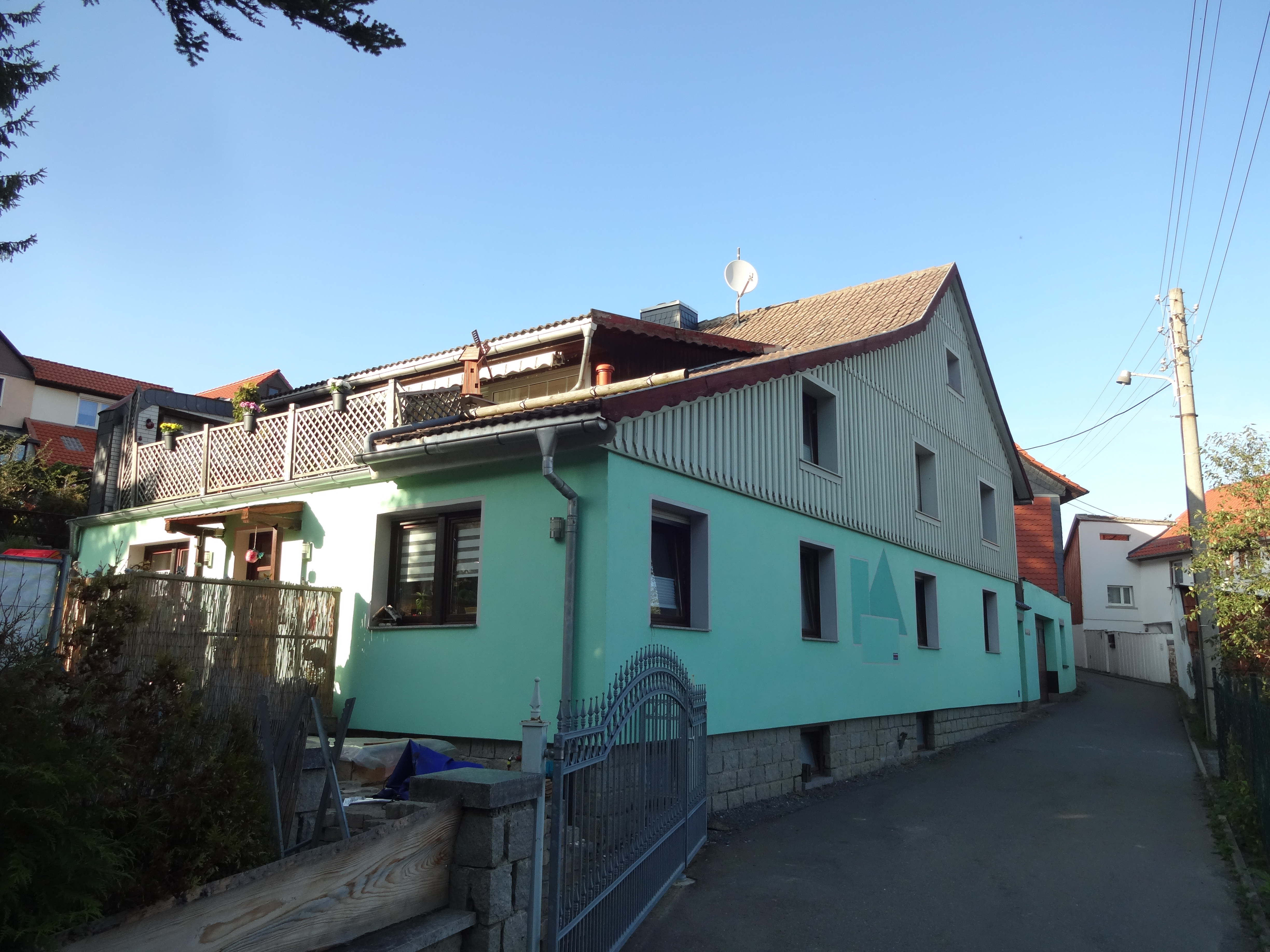 denkmalgeschütztes Wohnhaus in der Schustergasse 4 in Heimburg